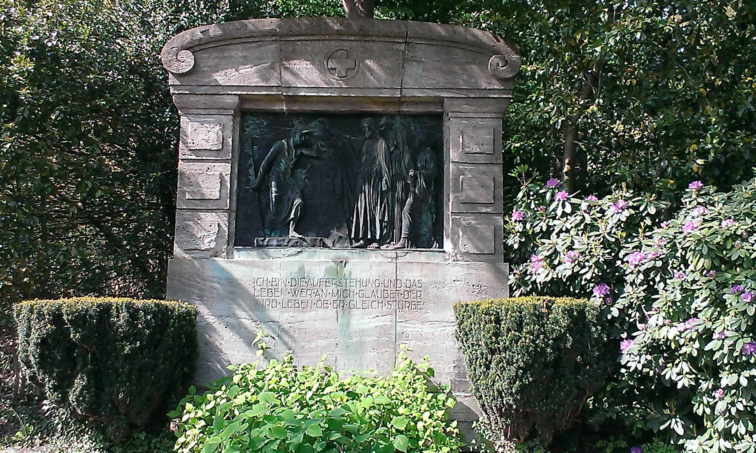 Denkmal am Friedhofseingang in Wetter (Ruhr).